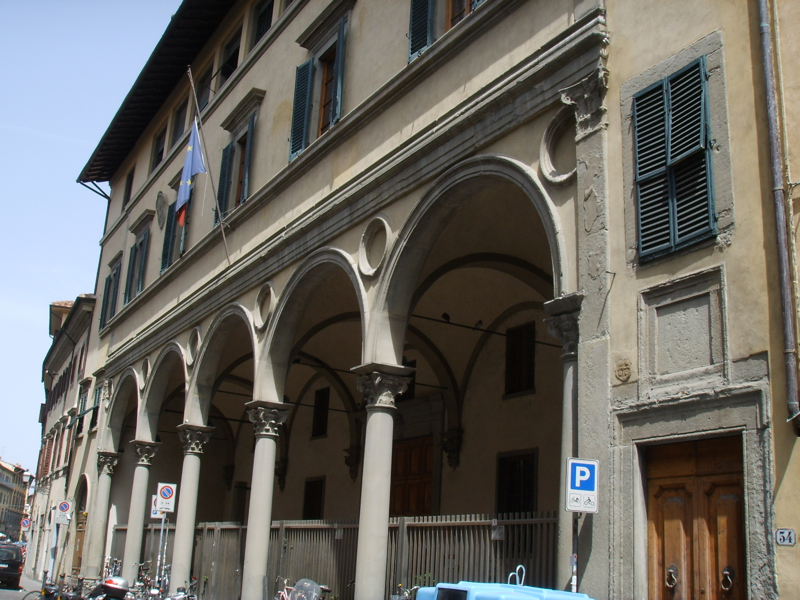 Loggia della Regione, in Via San Gallo, in Florence, Italy